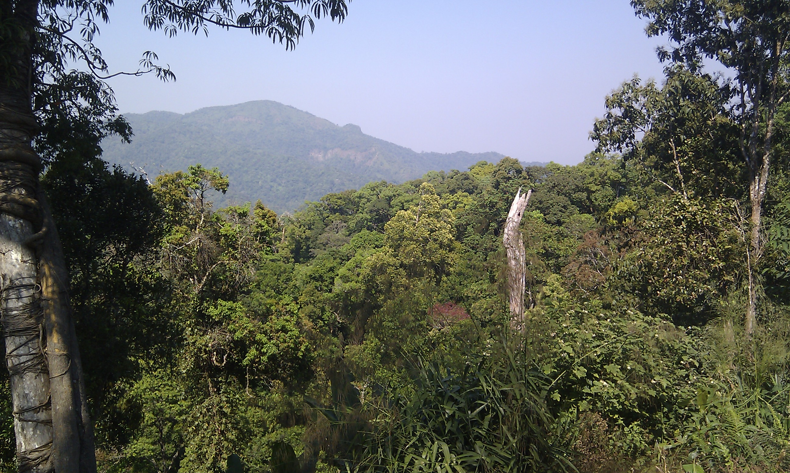 Kaeng Krachan National Park, Phetchaburi, Thailand